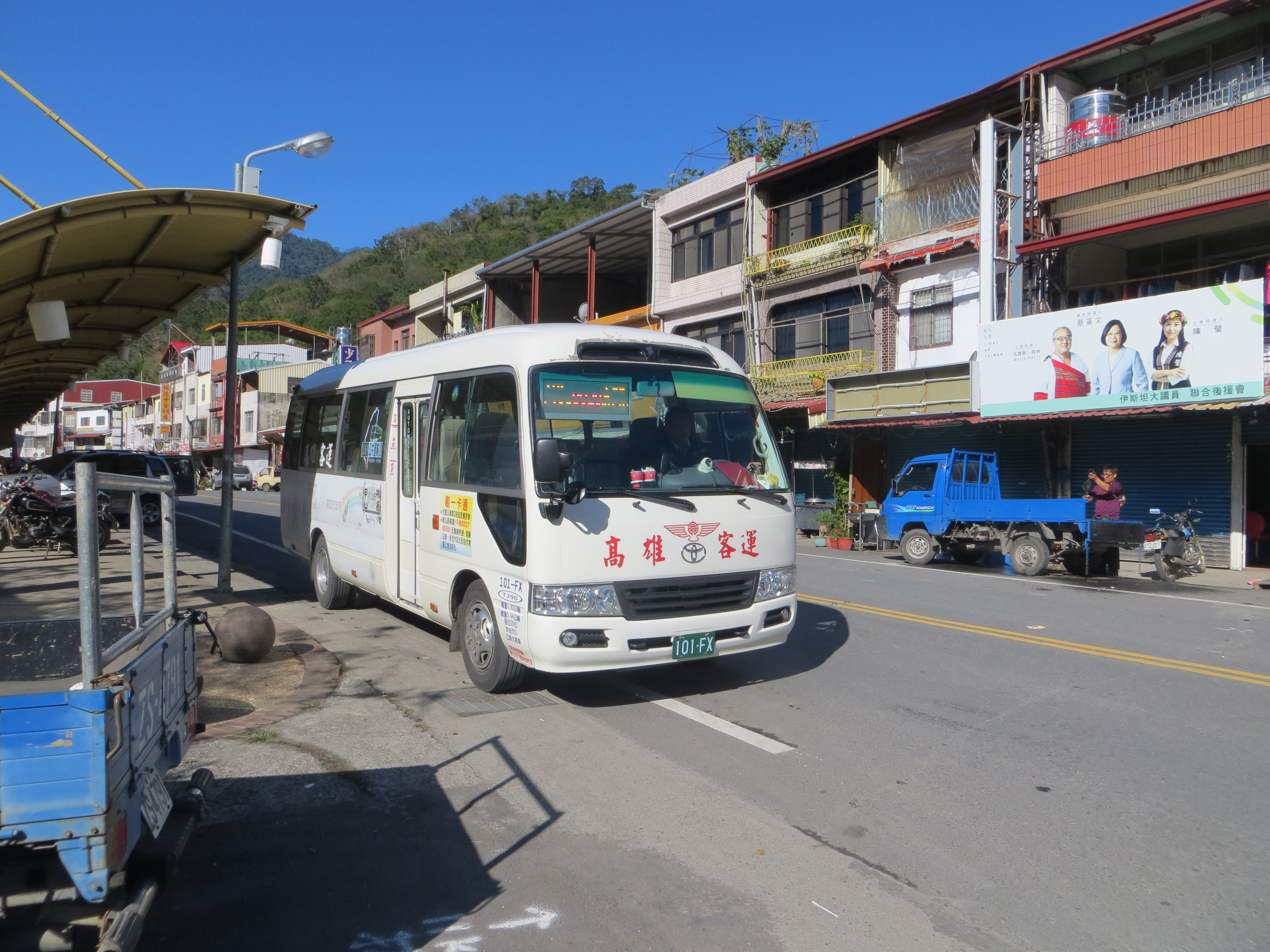 高雄客運旗下8029路線，以豐田COASTER營運；由於八八風災後復興仍未完成，至2016年1月9日僅行駛至桃源止，並改由甲仙出發，一天一往返。